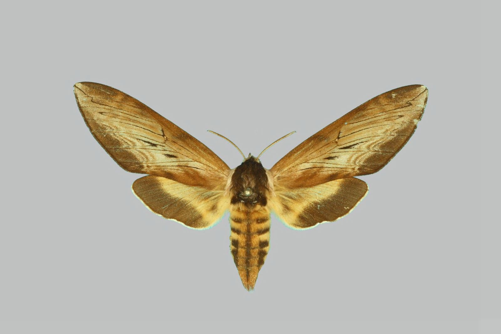 Sphinx luscitiosa, female, upperside.